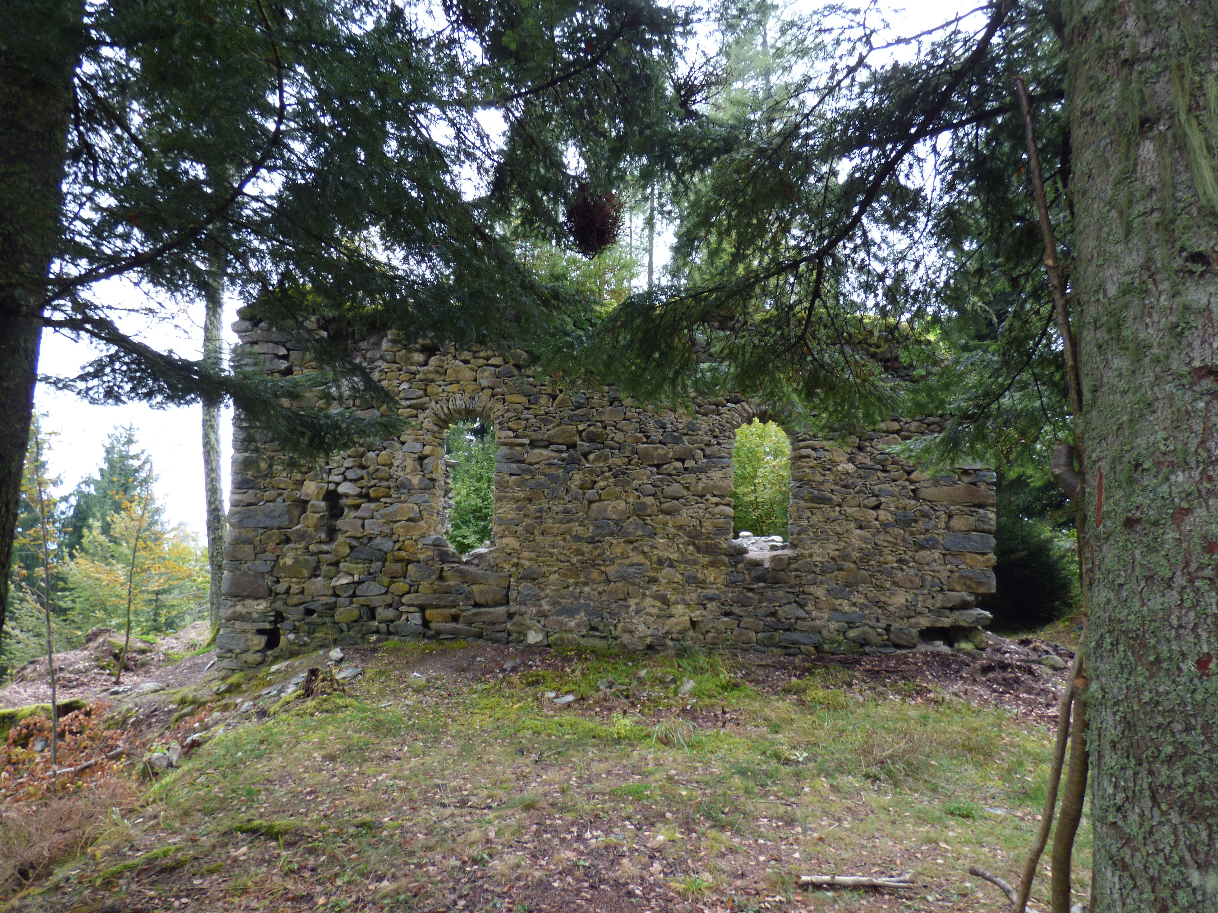 Burgruine Steuerberg (Marbauerschloss), Gemeinde Steuerberg, Kärnten. Burgkapelle